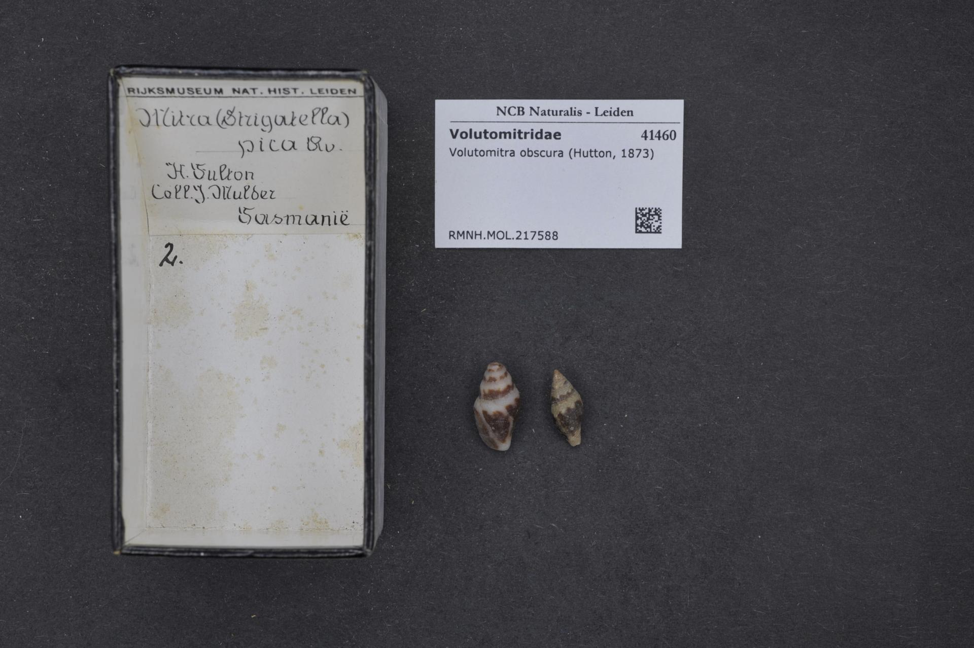 Volutomitra obscura (Hutton, 1873)